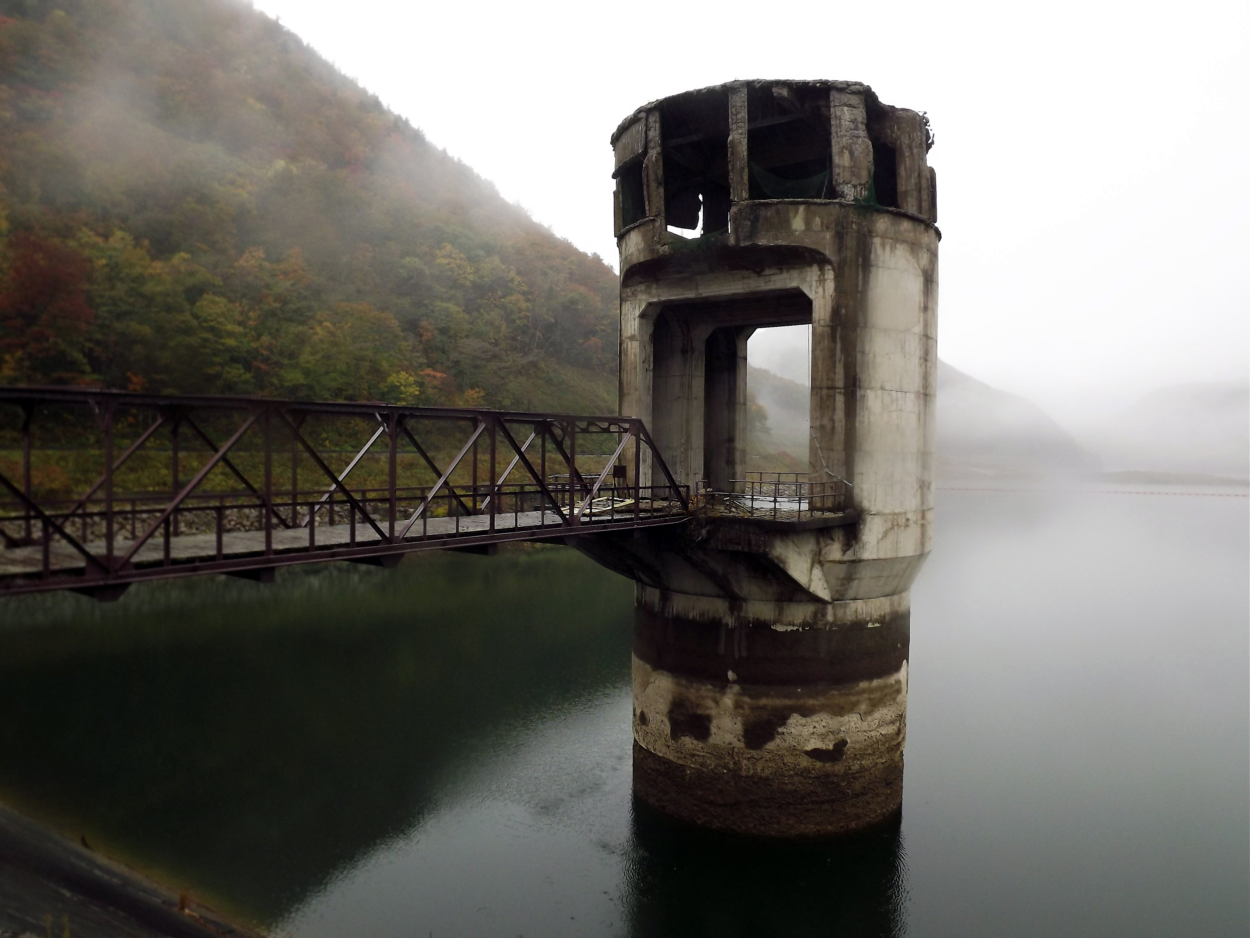 石淵ダム排水塔